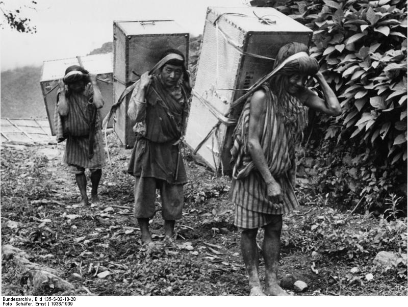 Lepschaträger bei Mangen